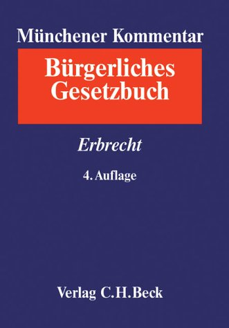 Münchener Kommentar